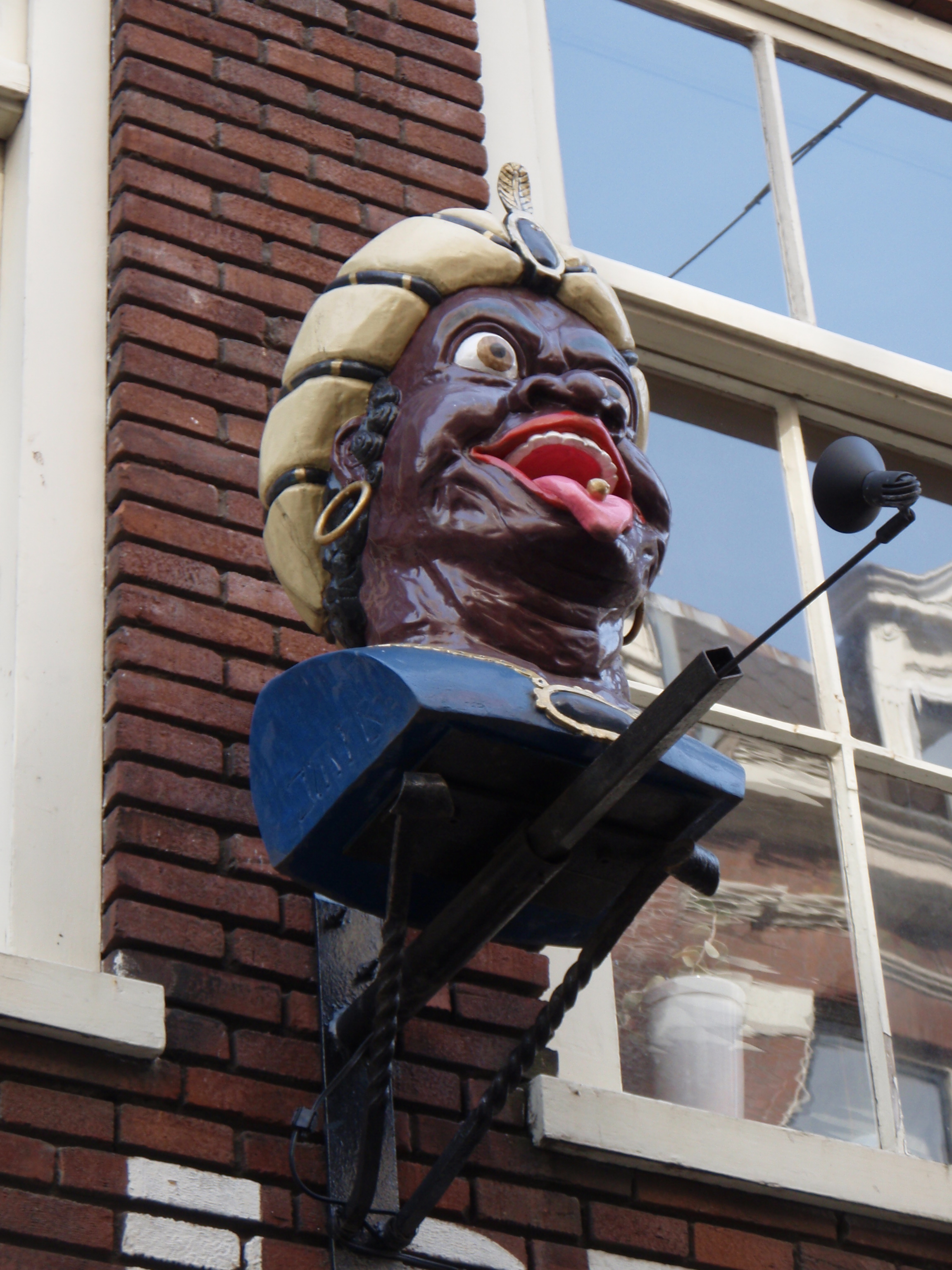 drogisterij winkel uithangbord